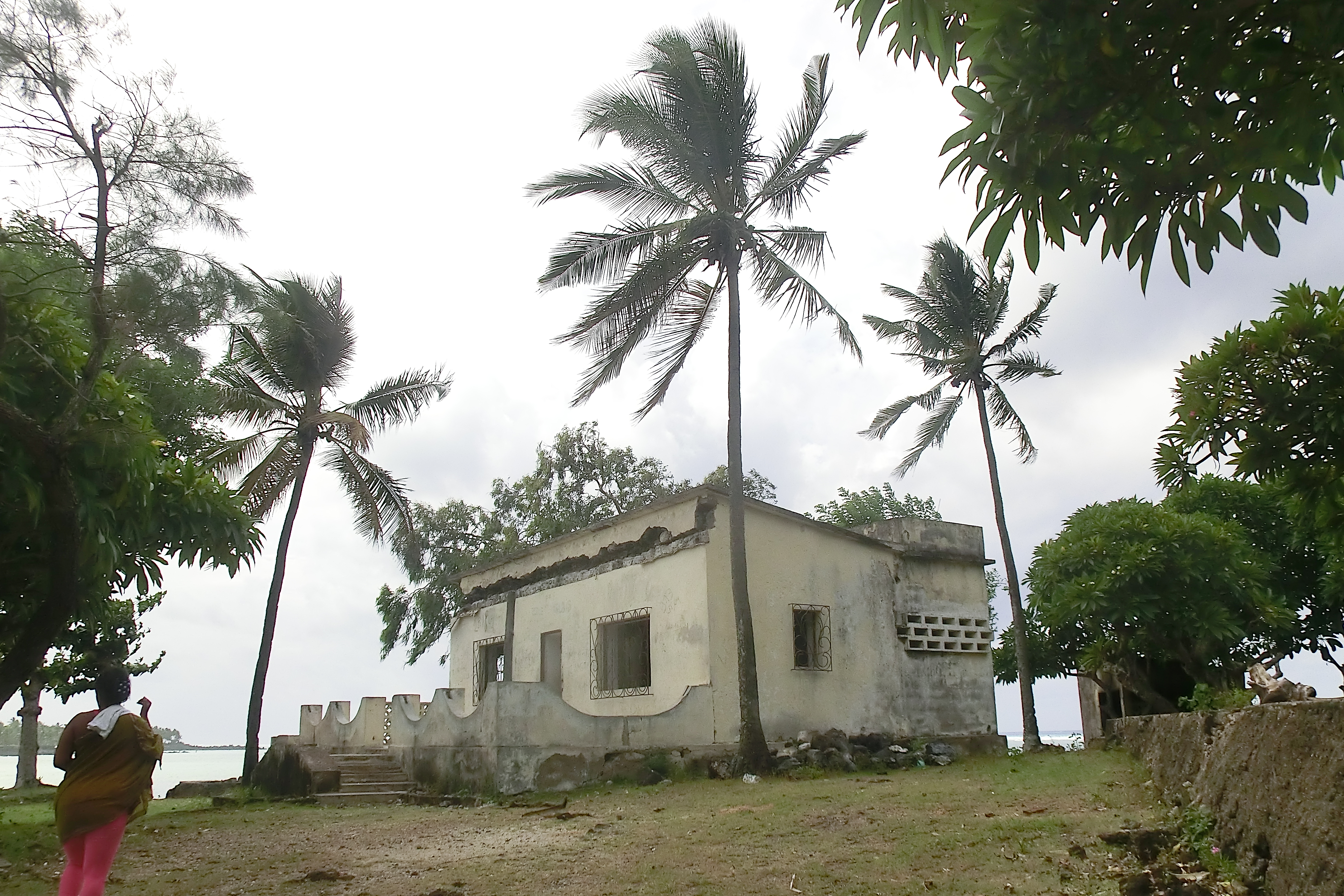 Residenza comoriana di Bob Denard